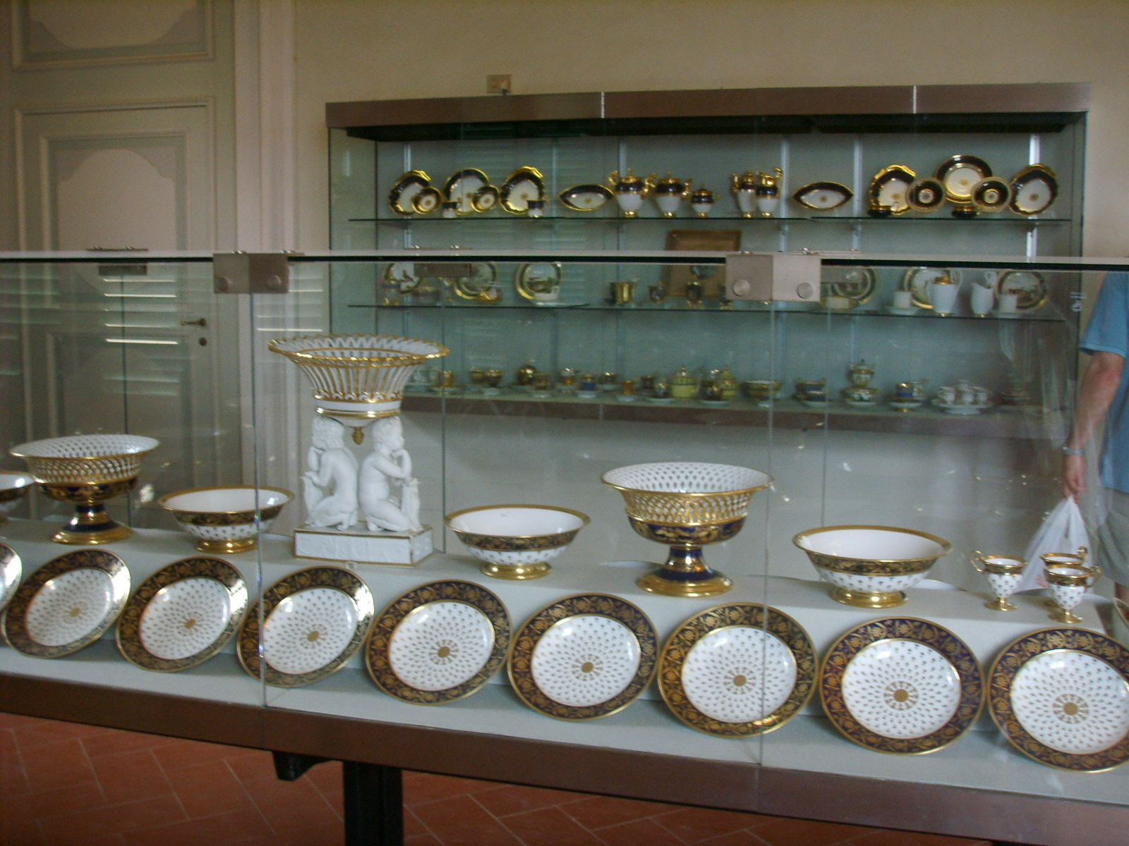 Museo delle porcellane di Firenze, secondo servizio di elisa baciocchi, sevres, 1809-1810